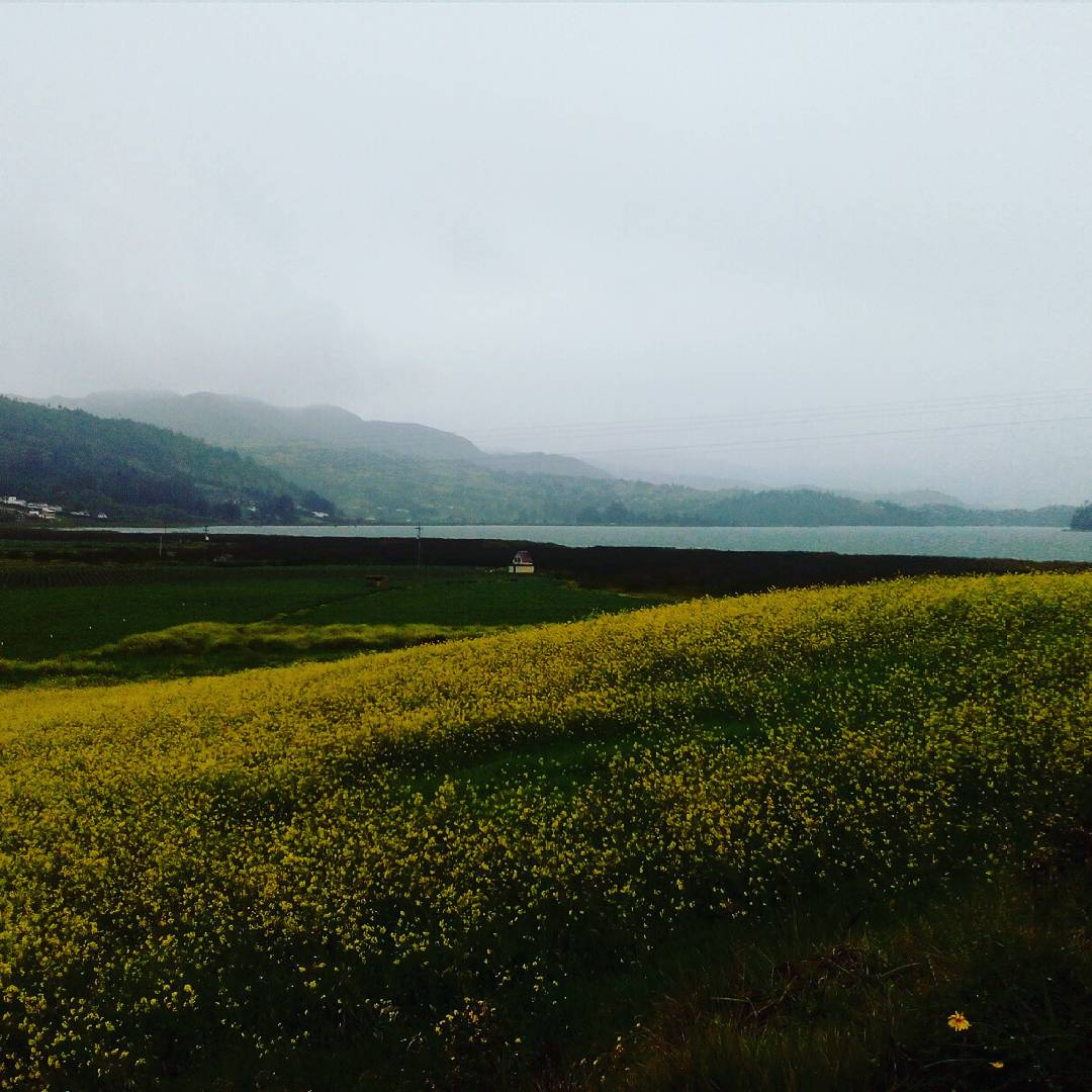 Foto tomada cerca de llano de alarcon